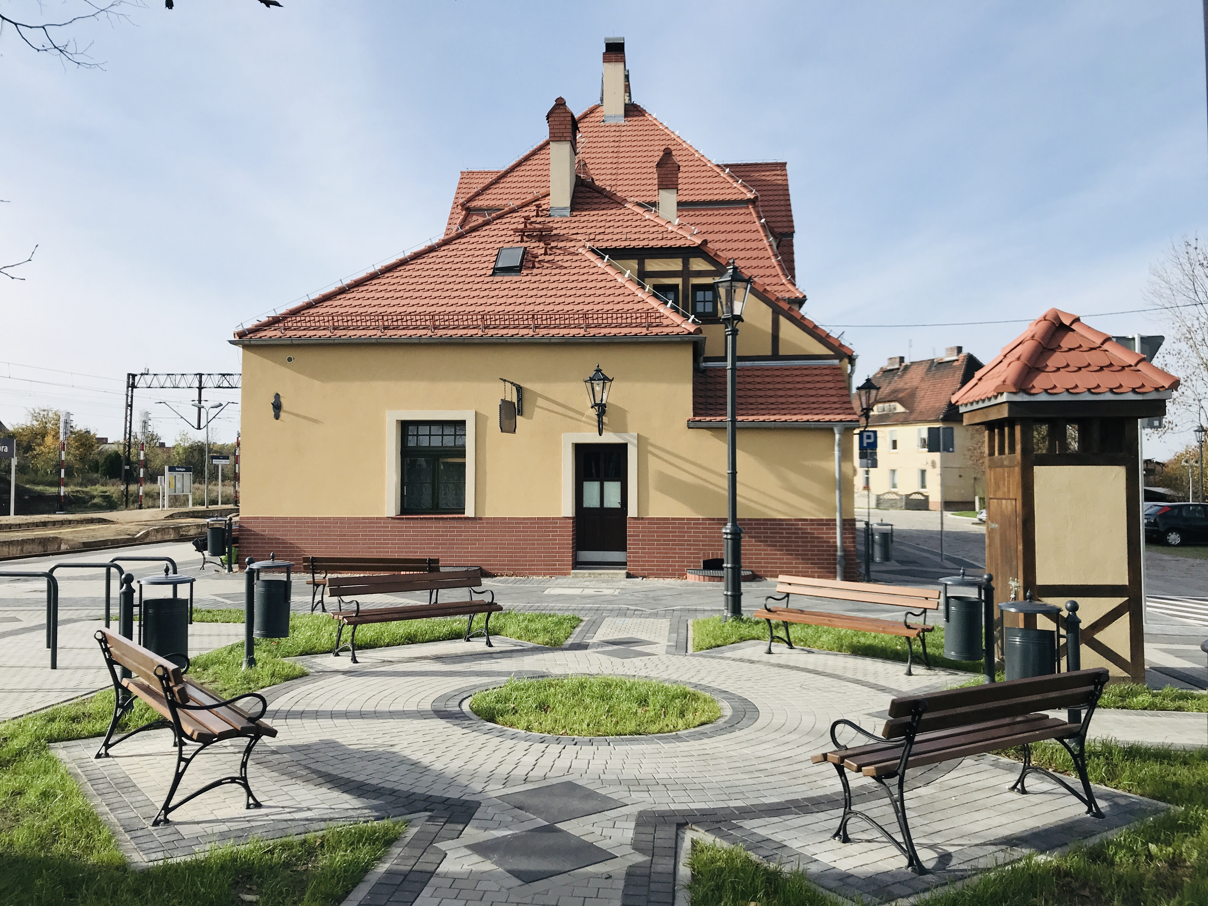 Dworzec kolejowy w Twardogórze (pow. oleśnicki, woj. dolnośląskie, Polska). Zdjęcie wykonane po rewitalizacji.